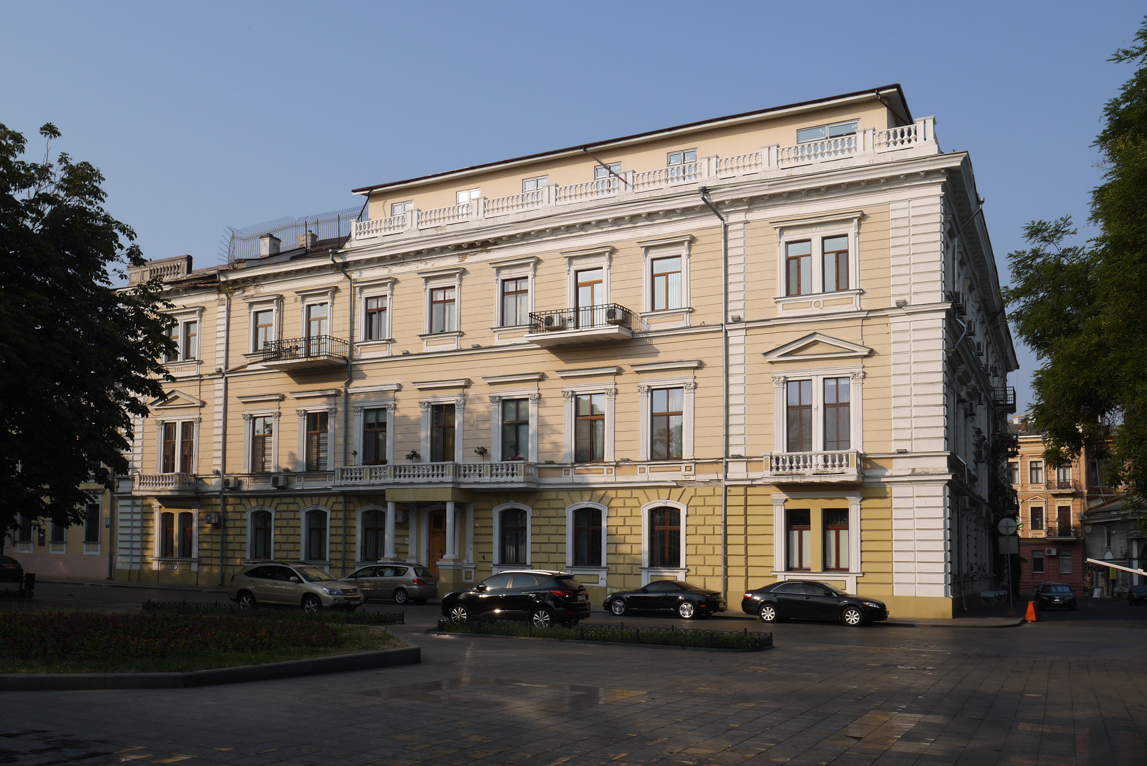 Будівля колишньої канцелярії Одеського генерал-губернатора, в якій у 1844-1846 рр. служив відомий російський поет Я.Полонський; у 1920–1923 роках розміщувалась редакція газети «Моряк», де працювали діячі культури: К.Паустовський, І.Бабель, Е.Багрицький, В.Катаєв, Л.Славін, І. Ільф, Ю.Олеша, В.Інбер та інші (будинок Потоцького, Маразлі), Одеса, Приморський бул., 1 (ріг Воронцовський пров., 1)